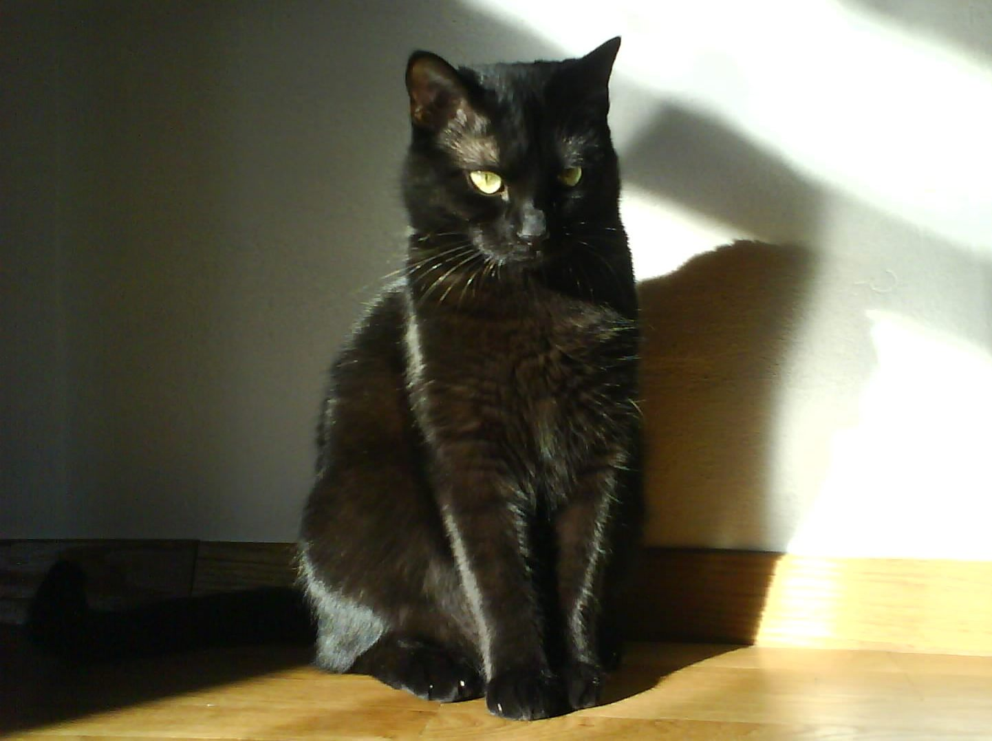 domača črna mačka po imenu Maci, samička, Ljubljana, Slovenija